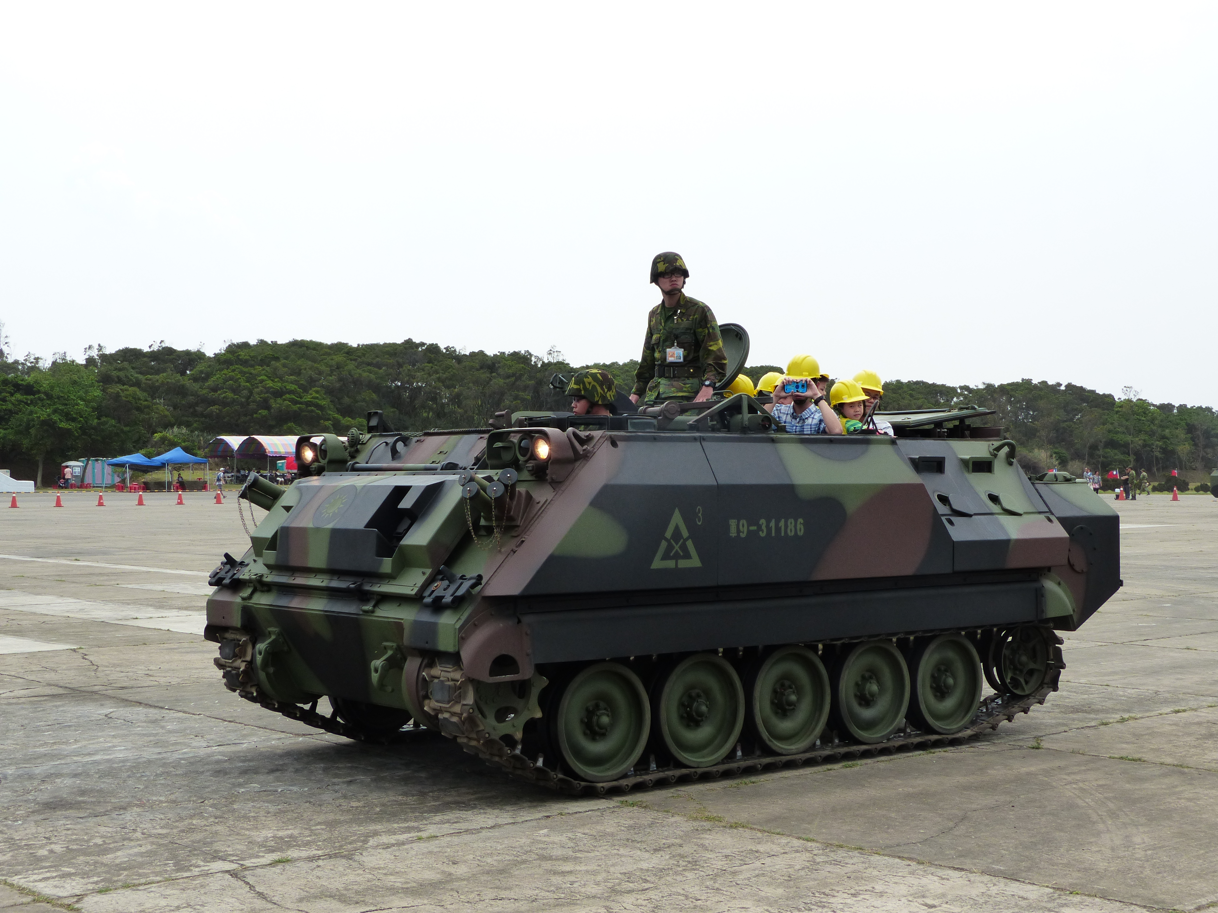 搭乘遊客體驗甲車試乘的CM-21裝甲運兵車。